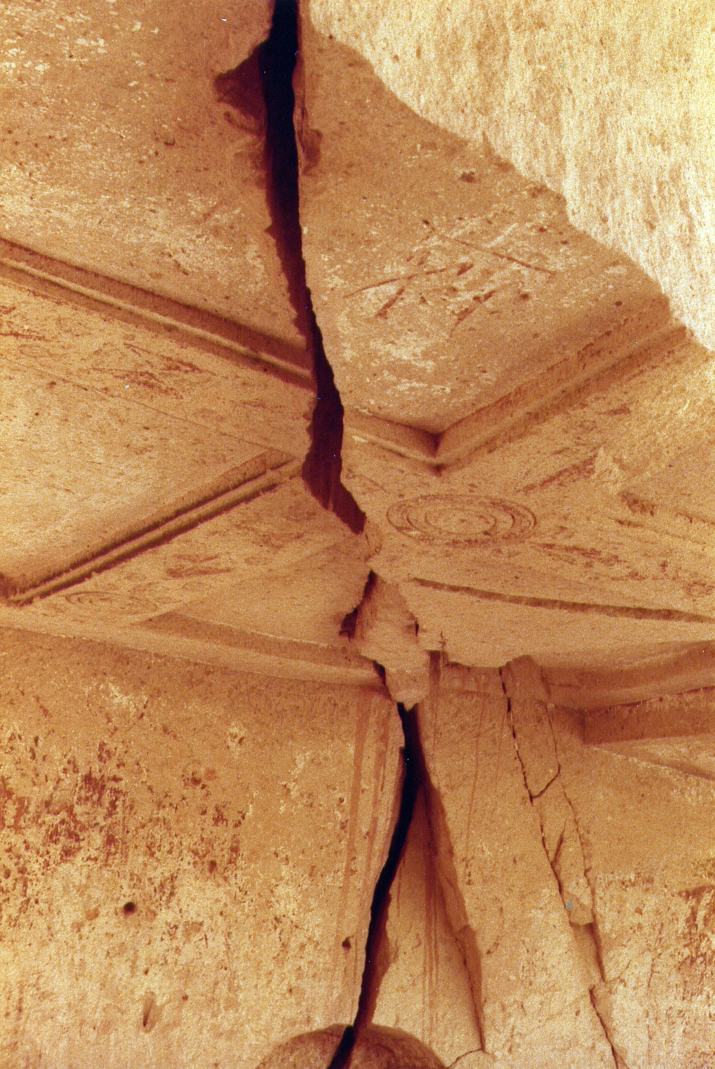 Nach Erdbeben zerbrochene Kirchendecke in Zelve, Kappadokien, Zentraltürkei